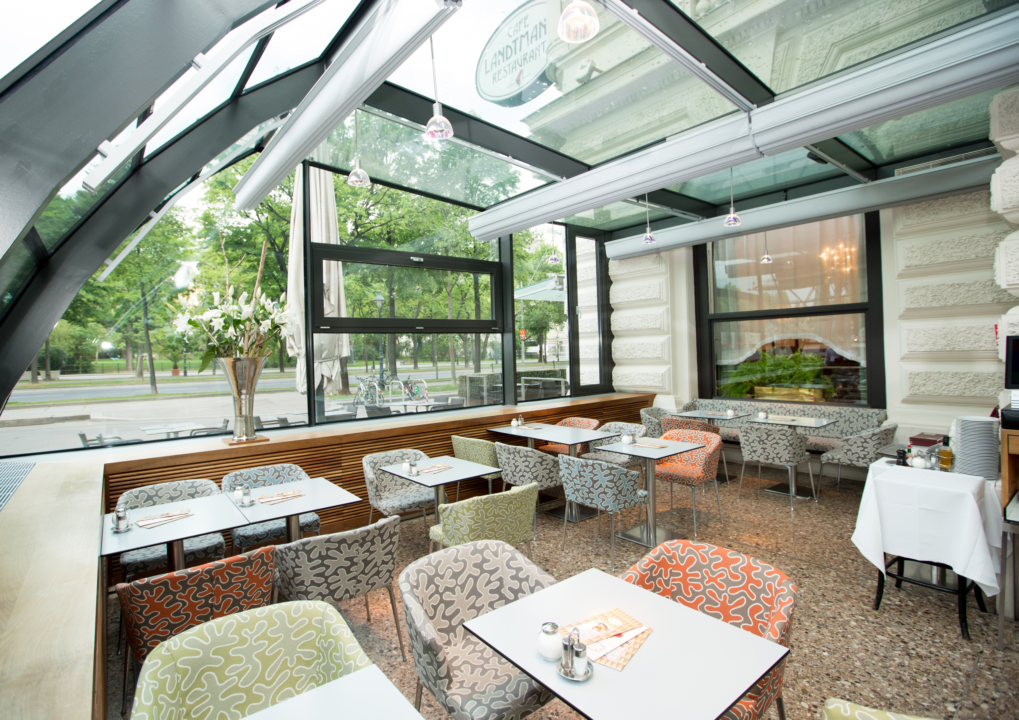 Wintergarten, Blickrichtung Universitätsring